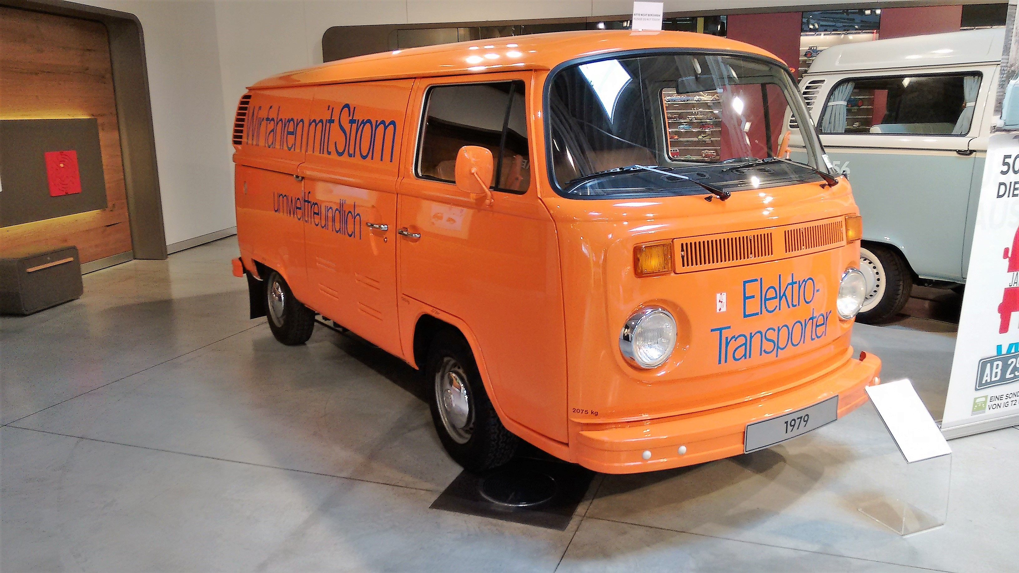 Für die Erlebnisausstellung im PS.SPEICHER in Einbeck präsentiertes Exponat des von Volkswagen produzierter T2-Elektro-Transporter vom "Bulli-Museum (Interessengemeinschaft T2 - Freunde des VW Busses 1967-1979 e.V.).